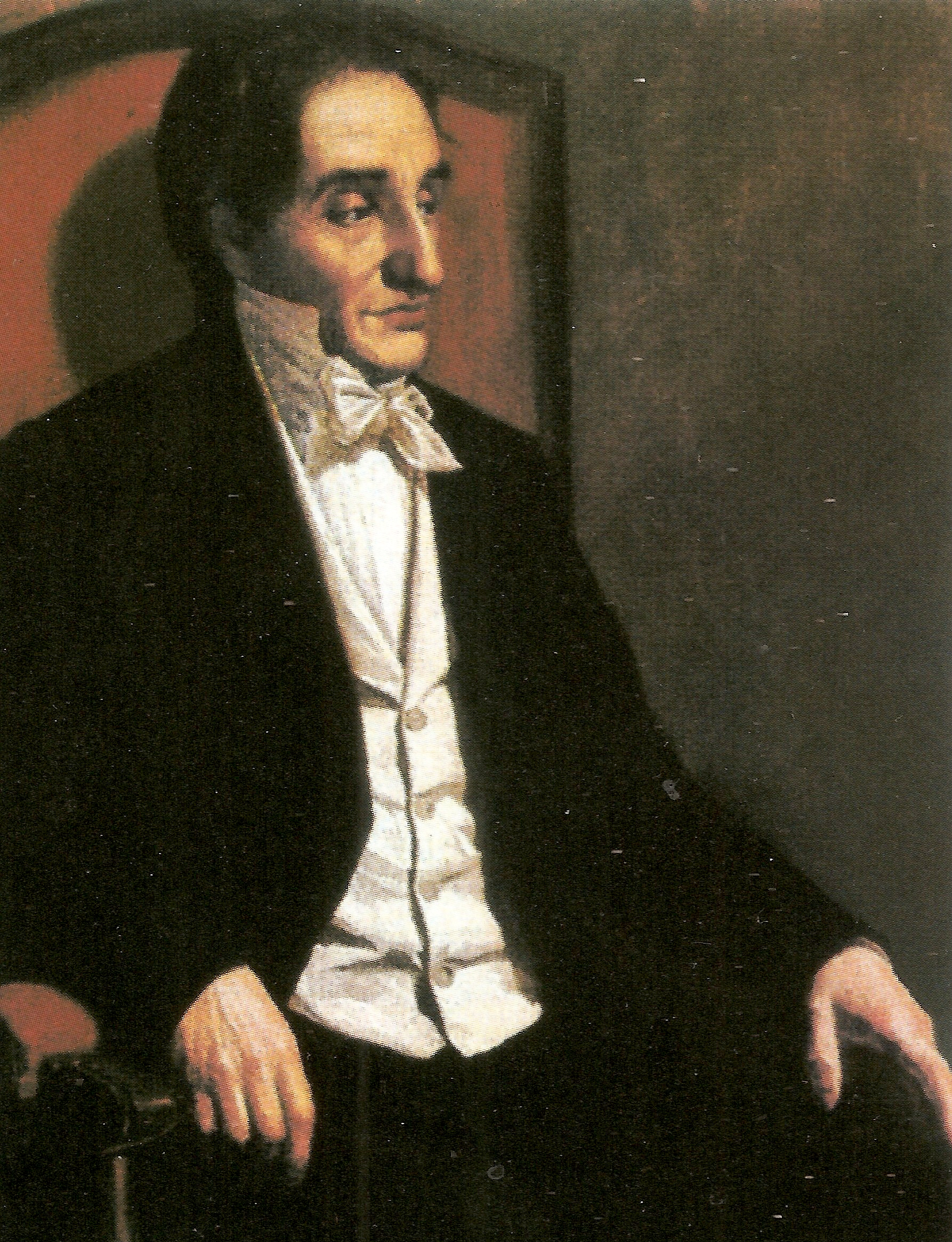 Retrato de Francisco Antonio Zea (1766-1822)